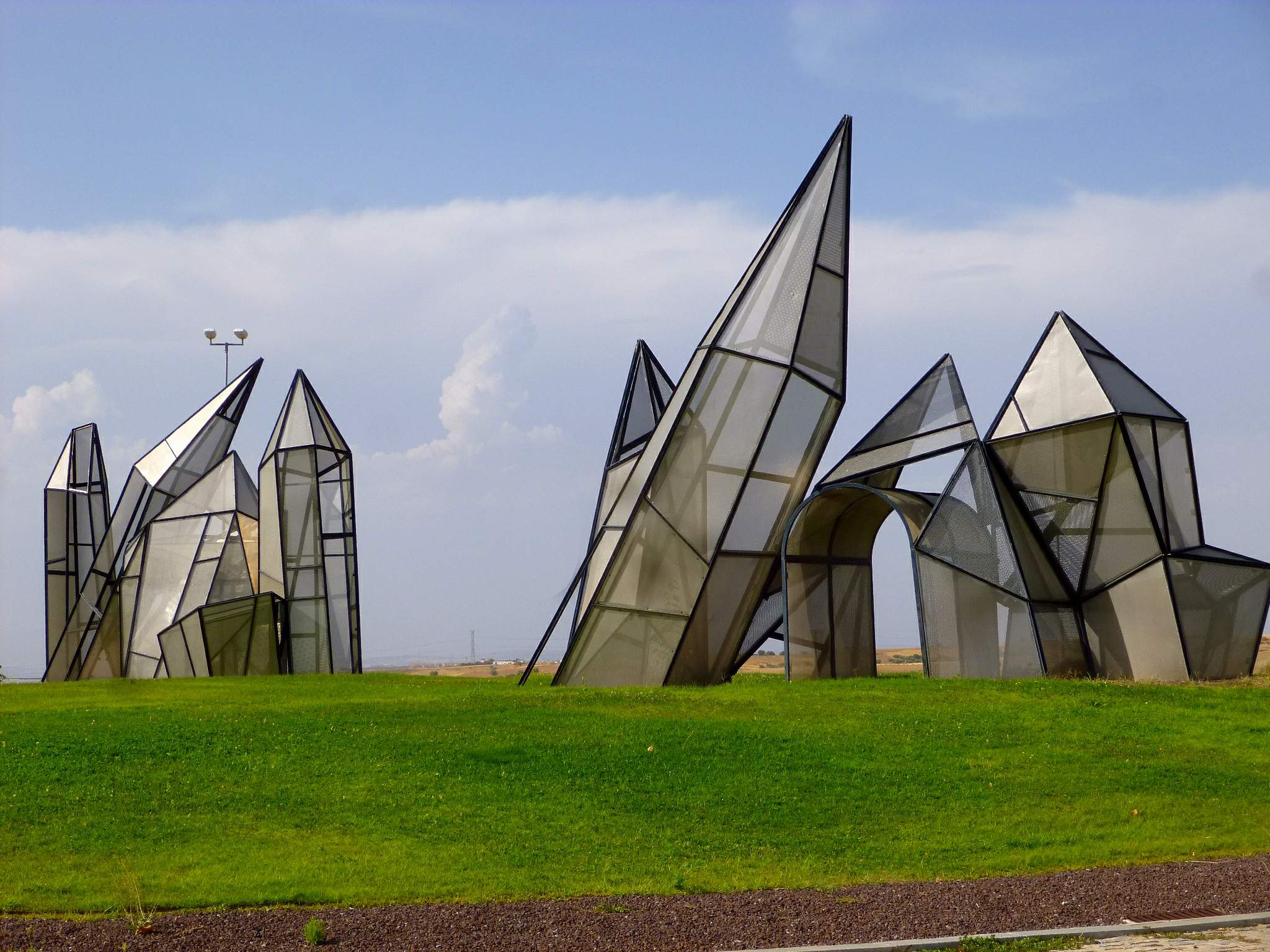 Navalcanero - Conjunto escultórico 'Chrystal Garden', obra de Dennis Oppenheim